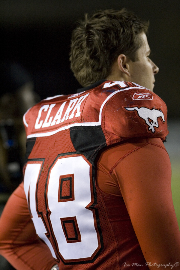 Looking on..